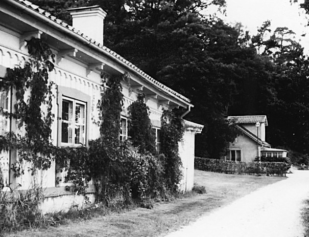 Byggmästarbostaden och maskinhuset från sydost.